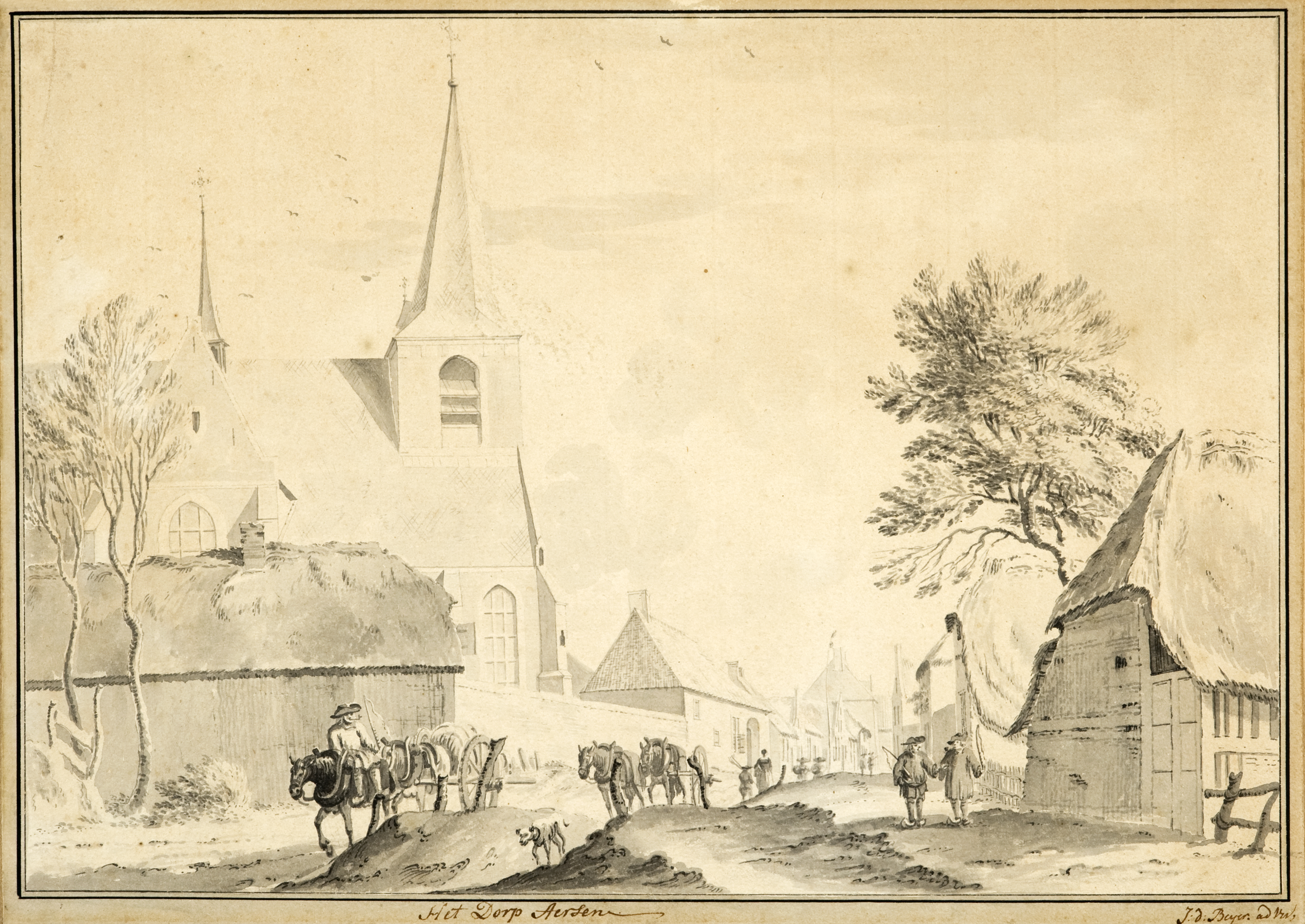 Gezicht op de dorpsstraat te Arcen. Links de kerk en enige huizen. Rechts een boerderij met daarbij enkele wandelaars. Links op de overharde weg, twee paarden met kar.